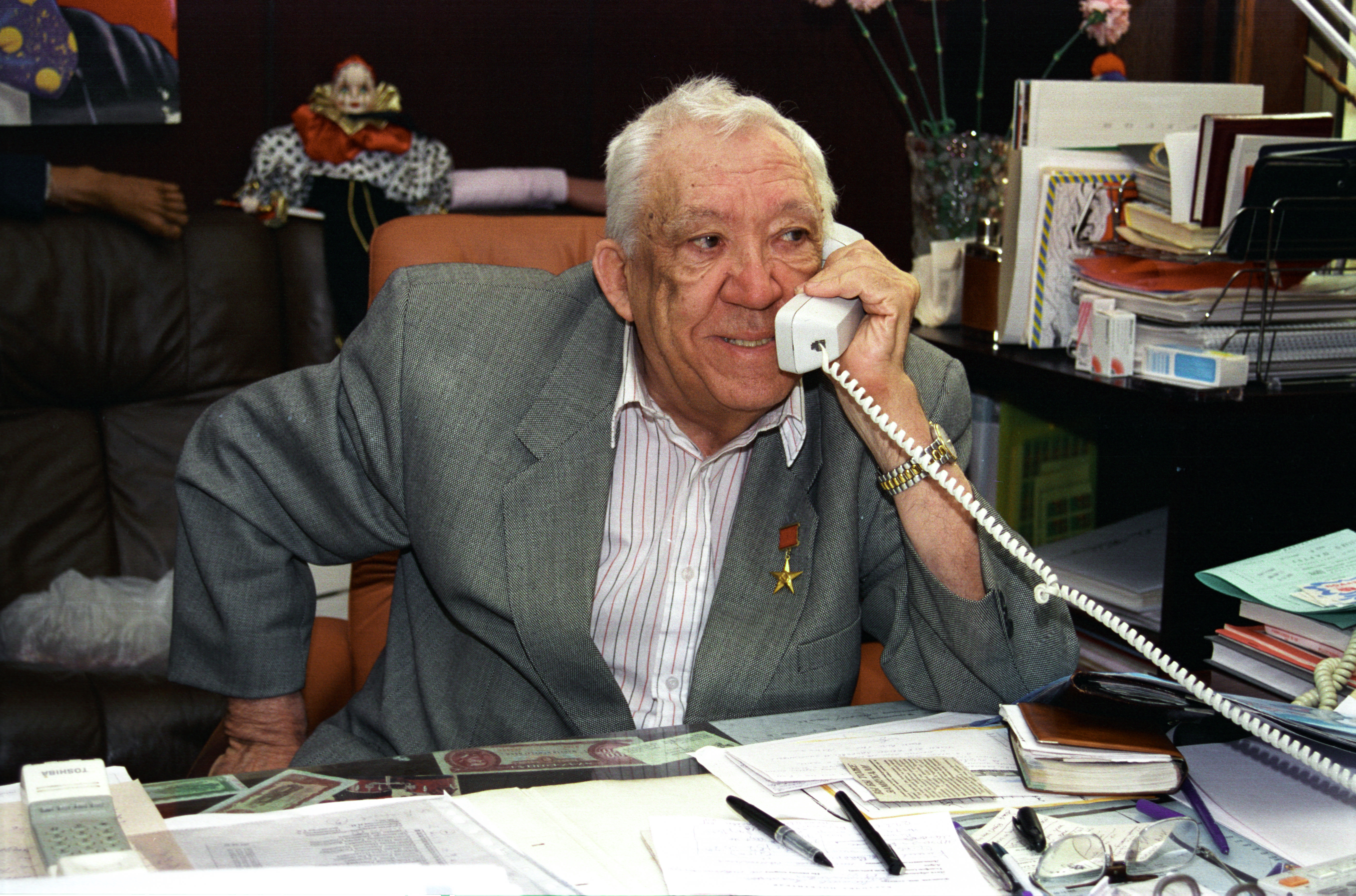 последнее фото